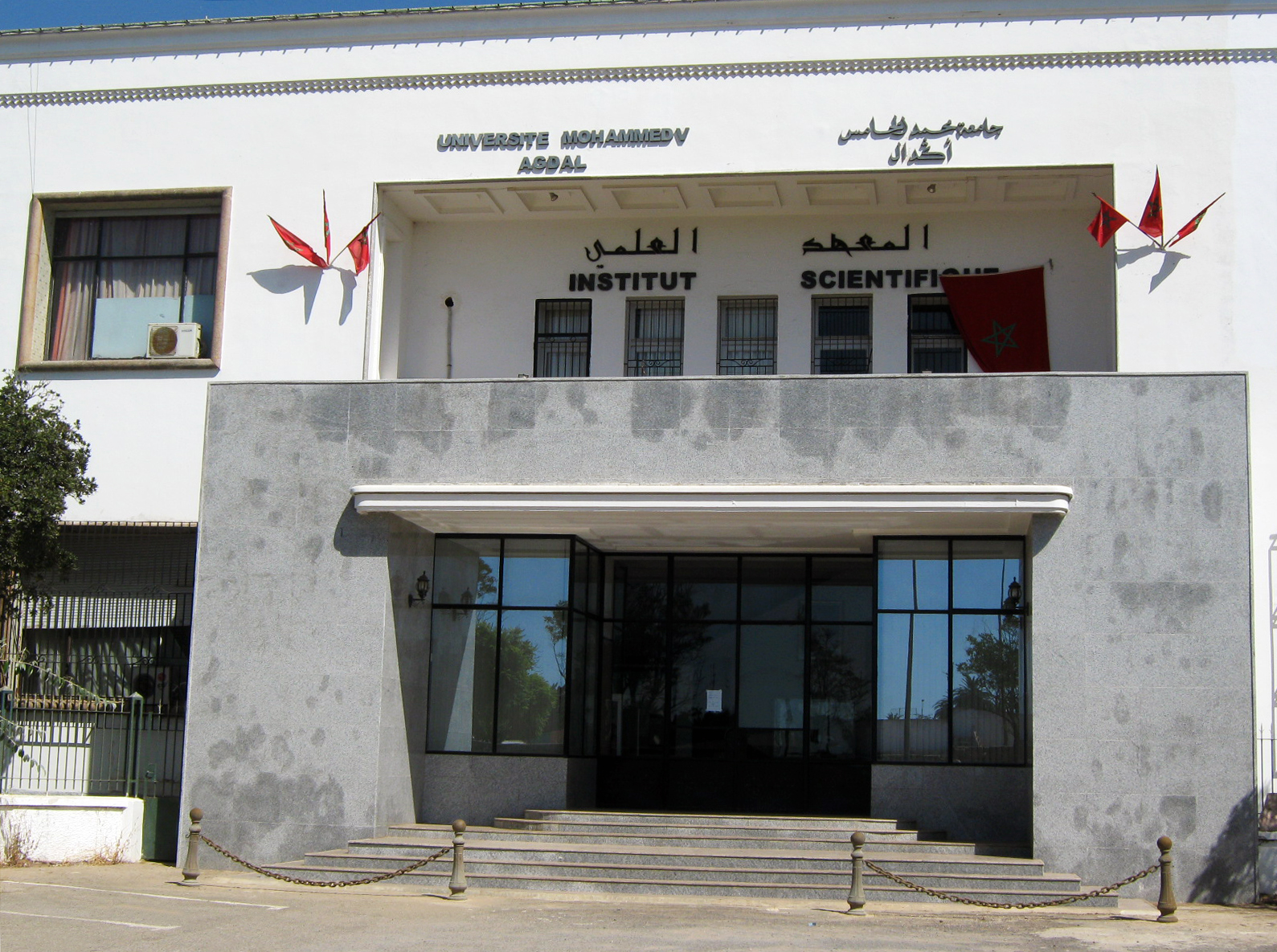 Façade de l'Institut Scientifique